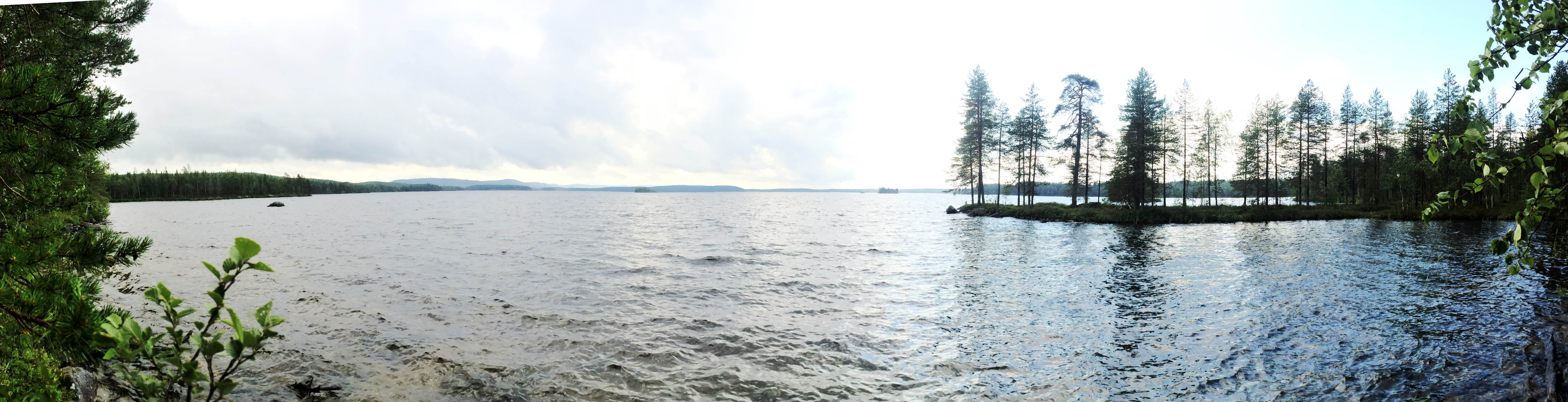 Воттомукс